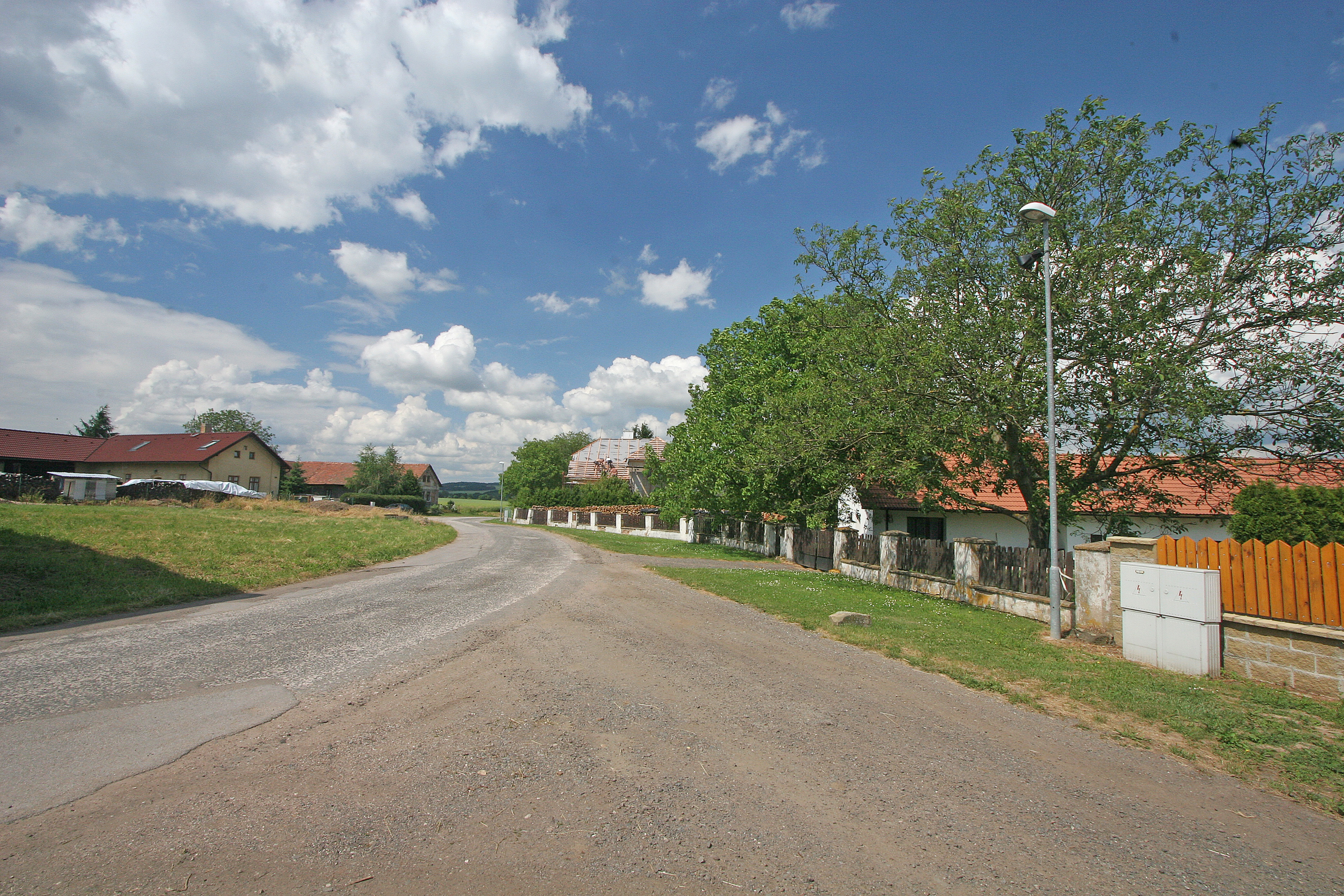 Rašín čp. 18